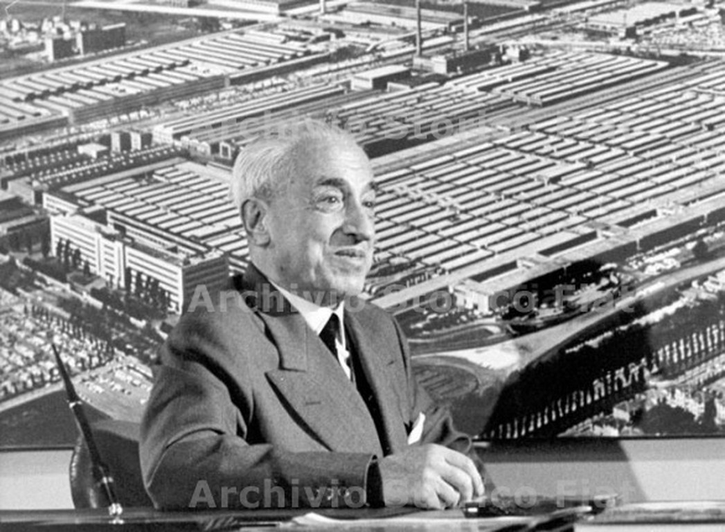 Fotografia a mezzo busto di Vittorio Valletta nel suo ufficio dello stabilimento Fiat Mirafiori, Torino (Fiat Group Marketing & Corporate Communication spa, Archivio e centro storico Fiat, Archivio iconografico, Personaggi Fiat, Vittorio Valletta)